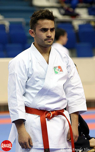 Guillermo Domínguez en el Karate Open de Paris.